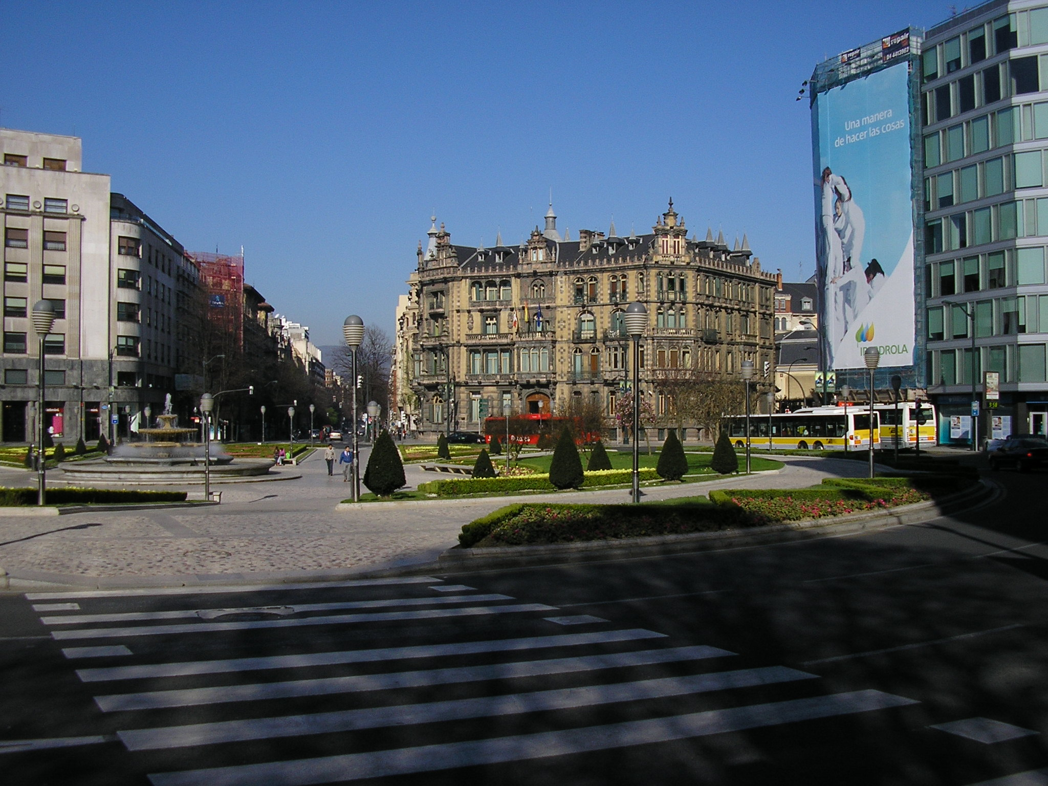 Plaza Moyúa, Zentraler Platz von Bilbao (Baskenland)